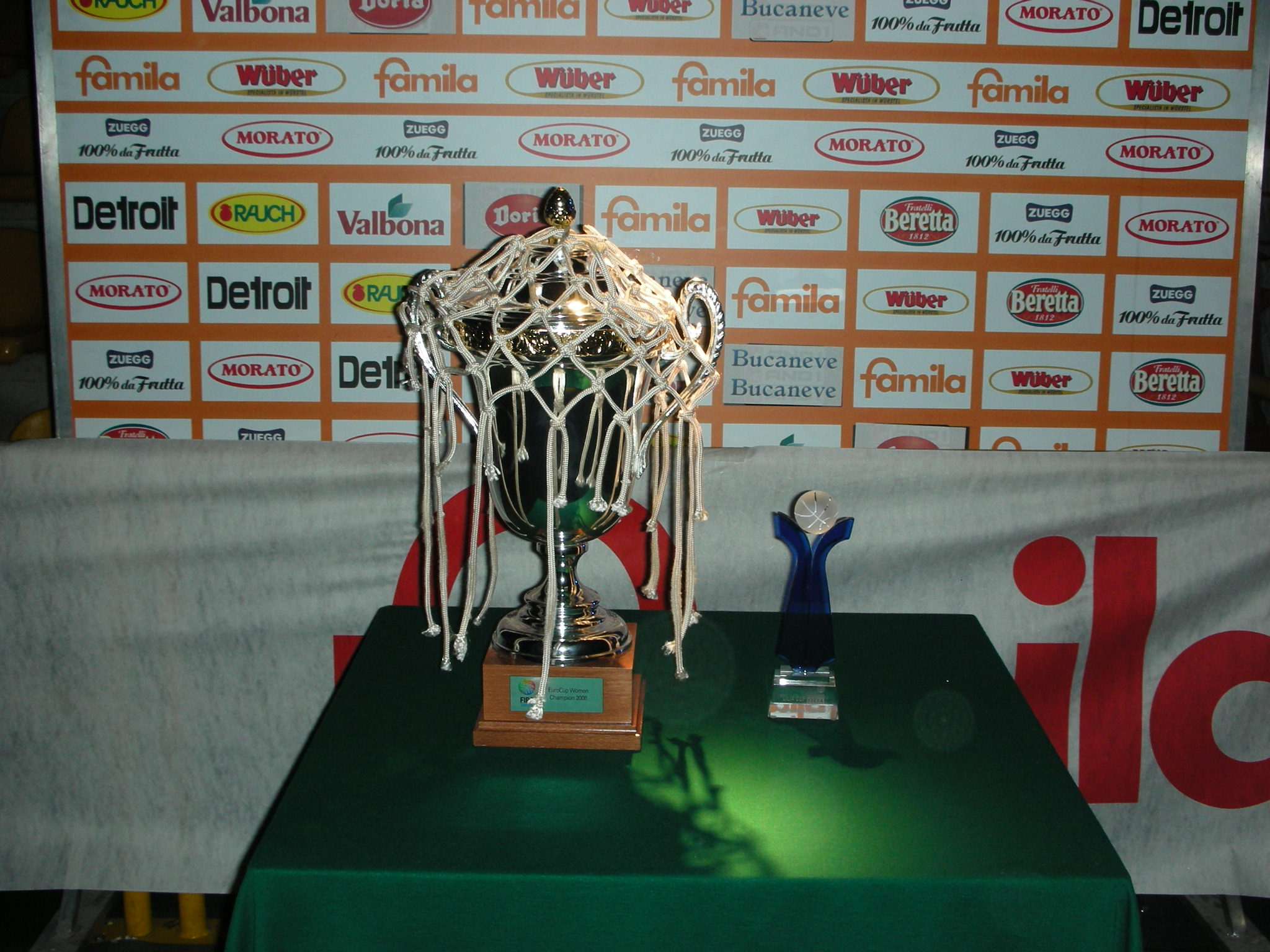 Scudetto 2008 e FIBA EuroCup 2008 vinte dalla Famila Wuber Schio